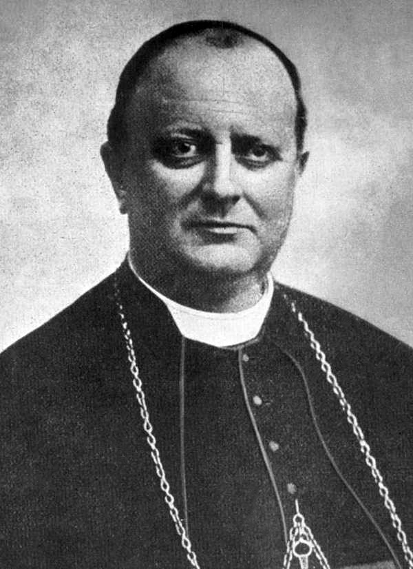 Vescovo Giacomo Radini-Tedeschi